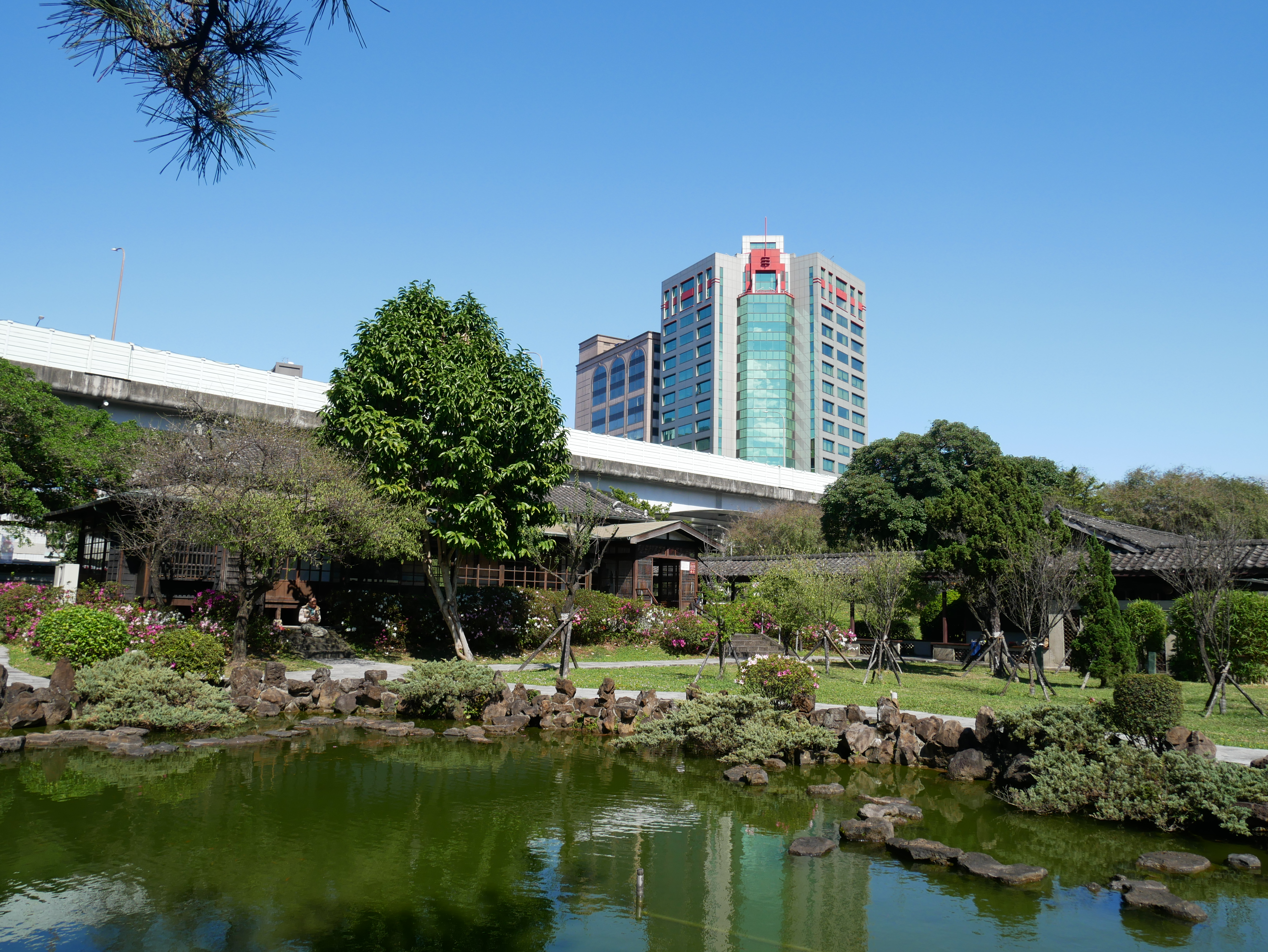 逸仙公園庭園，臺北市中正區城內次分區黎明里